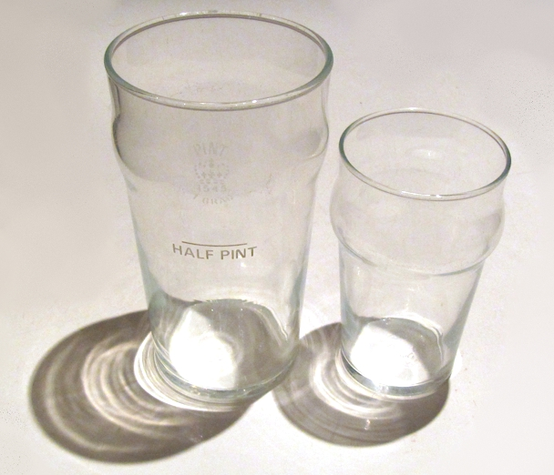 zwei Pint-Gläser: 1 Pint und ein halbes Pint